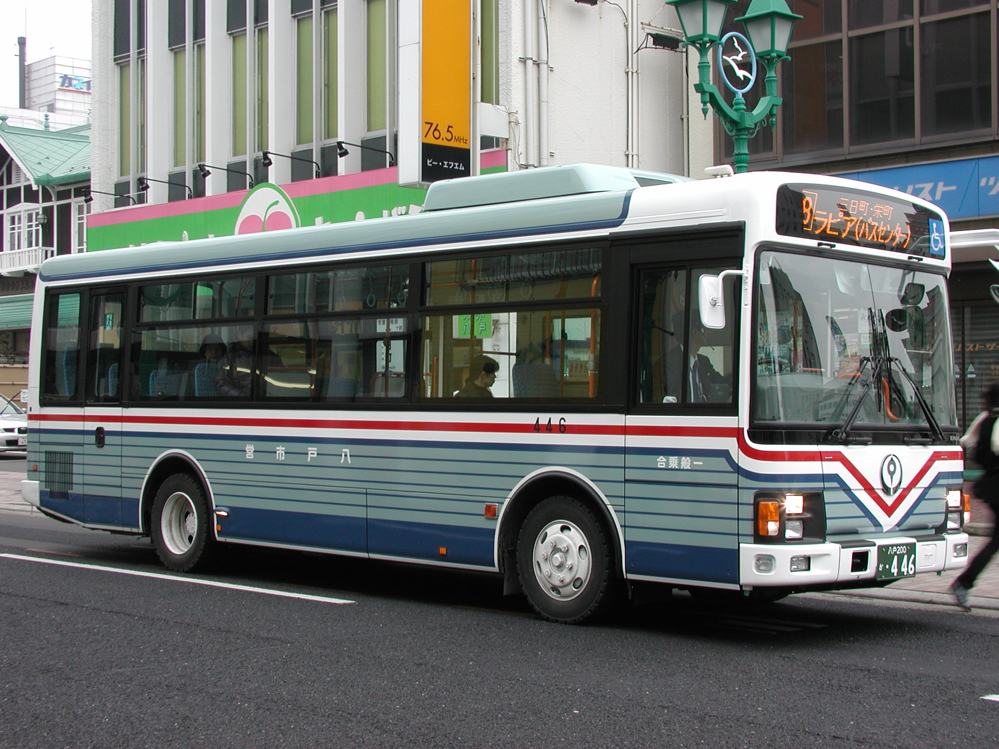 八戸市営バス一般路線塗色（いすゞ・エルガミオ：PDG-LR234J2改） 三日町（BeFM前）付近にて 最後まで残っていた自主発注前後扉車両（いすゞ・キュービック：IKC架装1台・富士5E架装2台）などを置き換える目的に、2007年12月に投入された中型ワンステップ車両である。